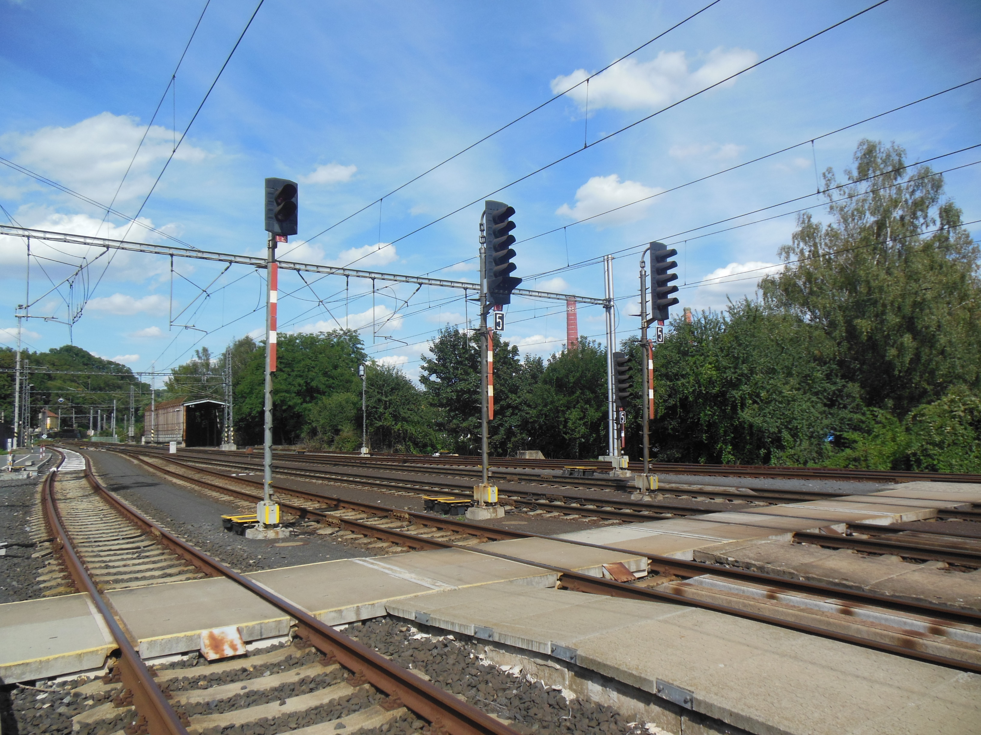 Roztoky u Prahy (okres Praha-západ). Nádraží, návěstidla ve směru na Kralupy.